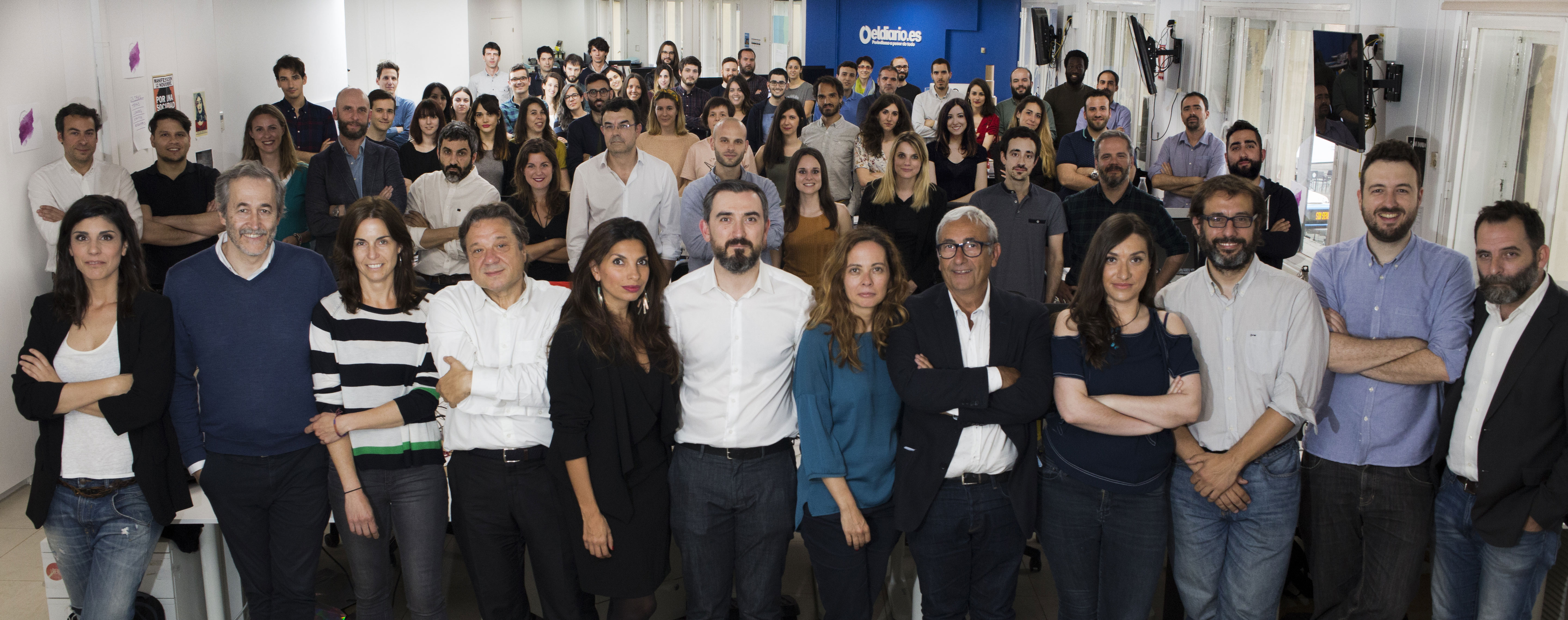 Foto de la redacción de eldiario.es